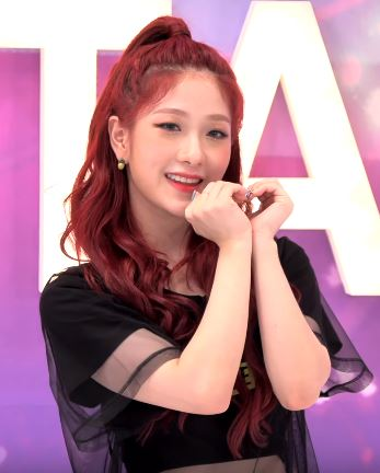 11일 오전 서울 상암동 tbs 오픈스튜디오에서 공개녹화로 ‘tbs 팩트인스타 - ‘프로미스나인’편이 진행됐다.